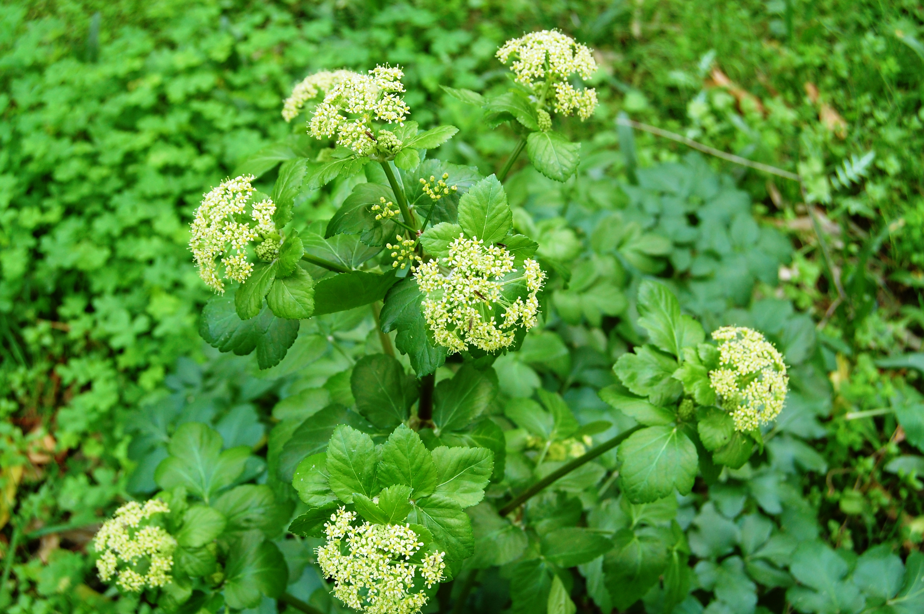 Smyrnium olusatrumRiserva naturale Monte Pellegrino